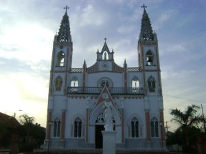 Iglesia San Jeronimo de Ayapel